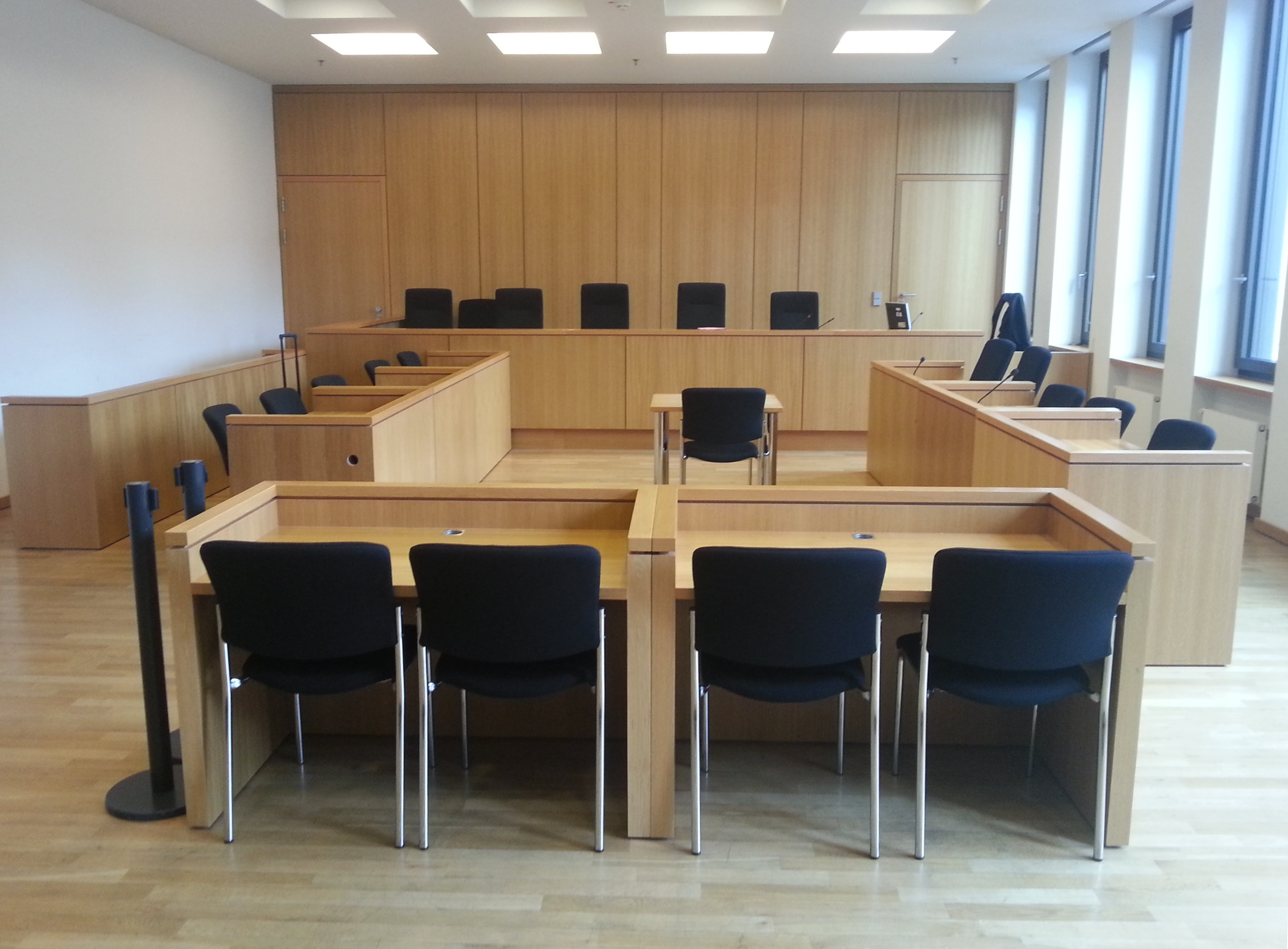 Blick aus dem Zuschauerbereich in einen Gerichtssaal des Justizzentrums Aachen. Am Kopfende sitzt leicht erhöht die Kammer des Gerichts. Dieser mittelgroße Saal ist zum Beispiel für große Strafkammern des Landgerichts geeignet, die aus 3 Berufsrichtern und 2 Schöffen (ehrenamtliche Richter) bestehen. Die rechte Türe im Hintergrund führt in das Beratungszimmer der Kammer. Durch die linke Türe können Angeklagte aus dem Haftbereich auf völlig separatem Wege (Vermeidung der Fluchtgefahr) von Justizwachmeistern in den Gerichtssaal gebracht werden.